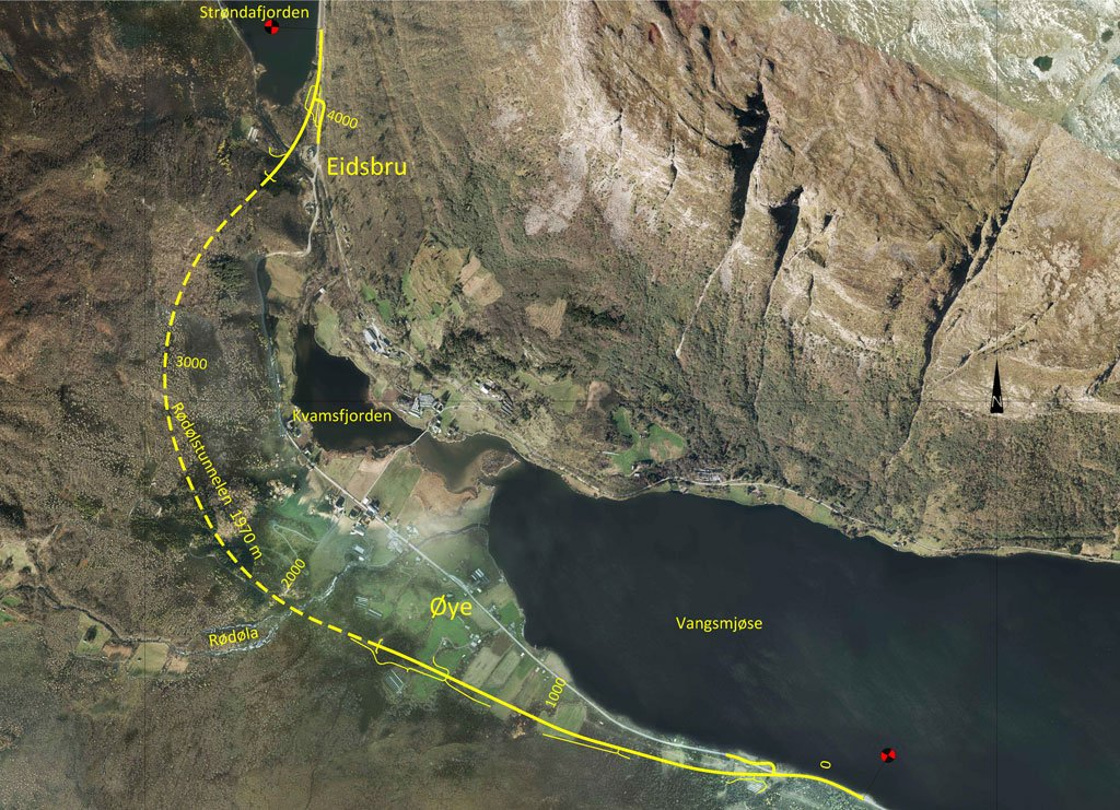 Kart over veitrase Eidsbru-Øye på E16 i Vang, Valdres.